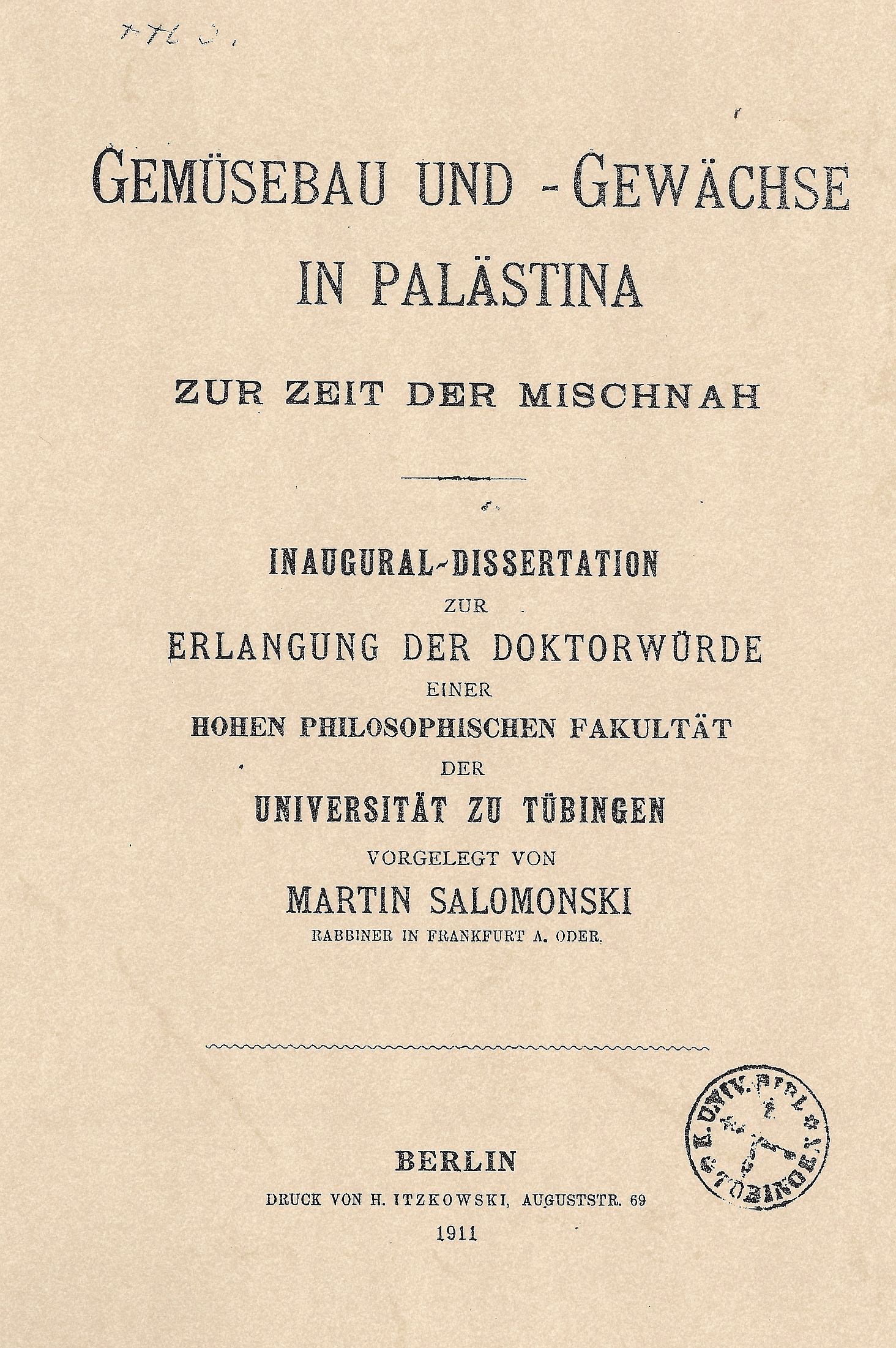 Deckblatt der Inaugural-Dissertation Gemüseanbau und -gewächse in Palästina zur Zeit der Mischnah zur Erlangung der Doktorwürde, vorgelegt von Martin Salomonski.